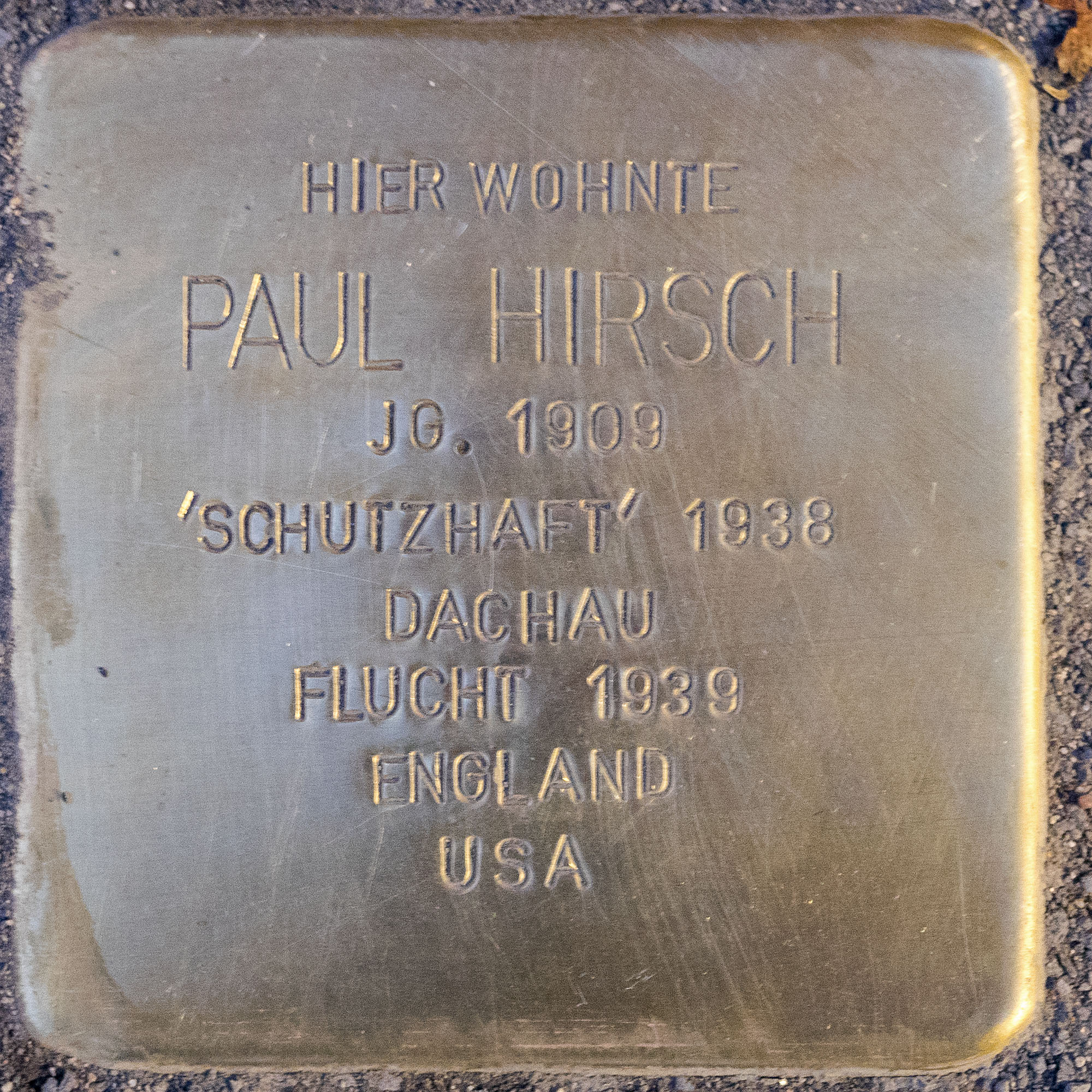 2016 11 25 Stolpersteine Kempen Hirsch Paul